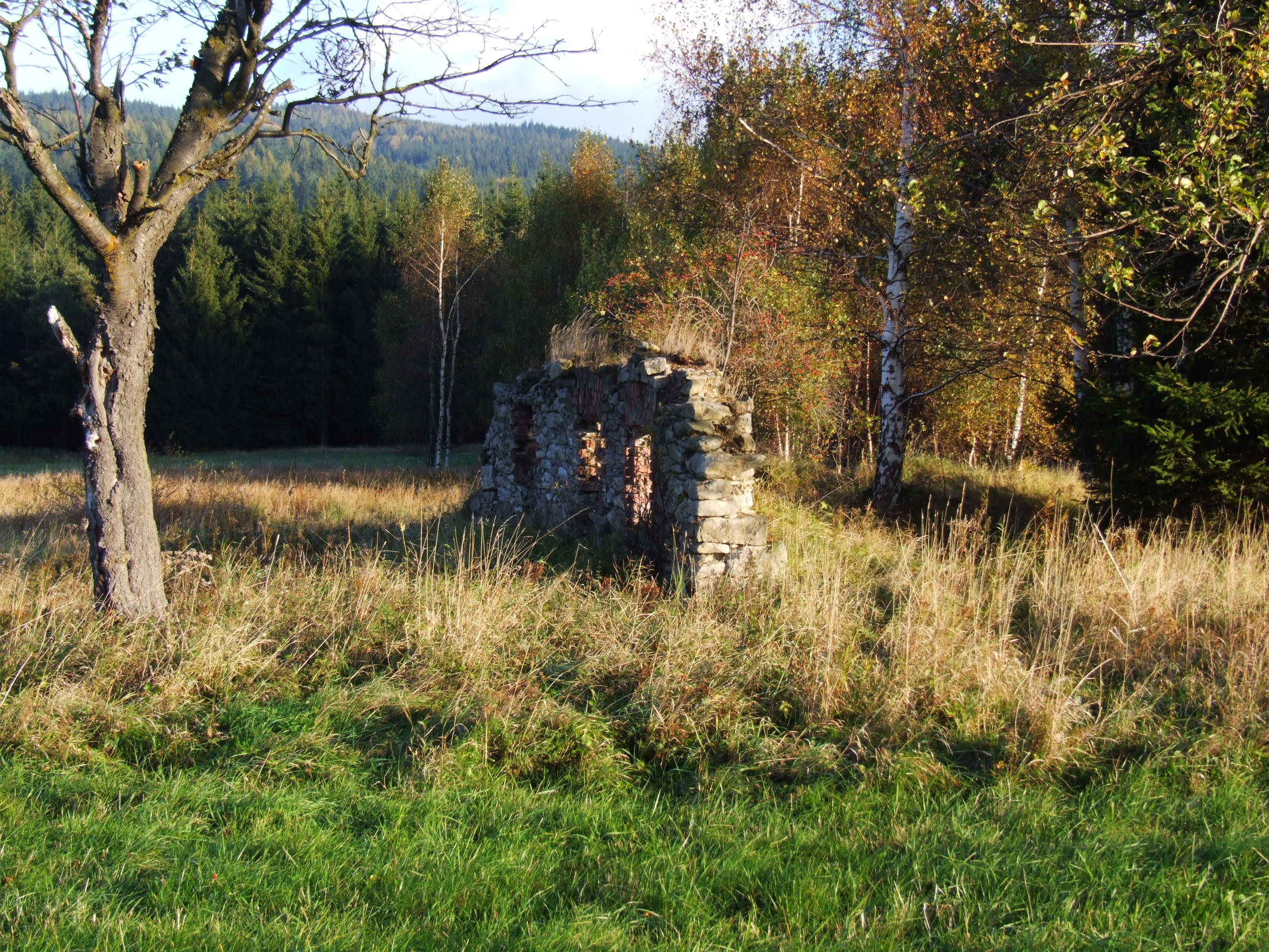 Česky: Hraničky (Gränzdorf), Rychlebské hory - schátralý dům